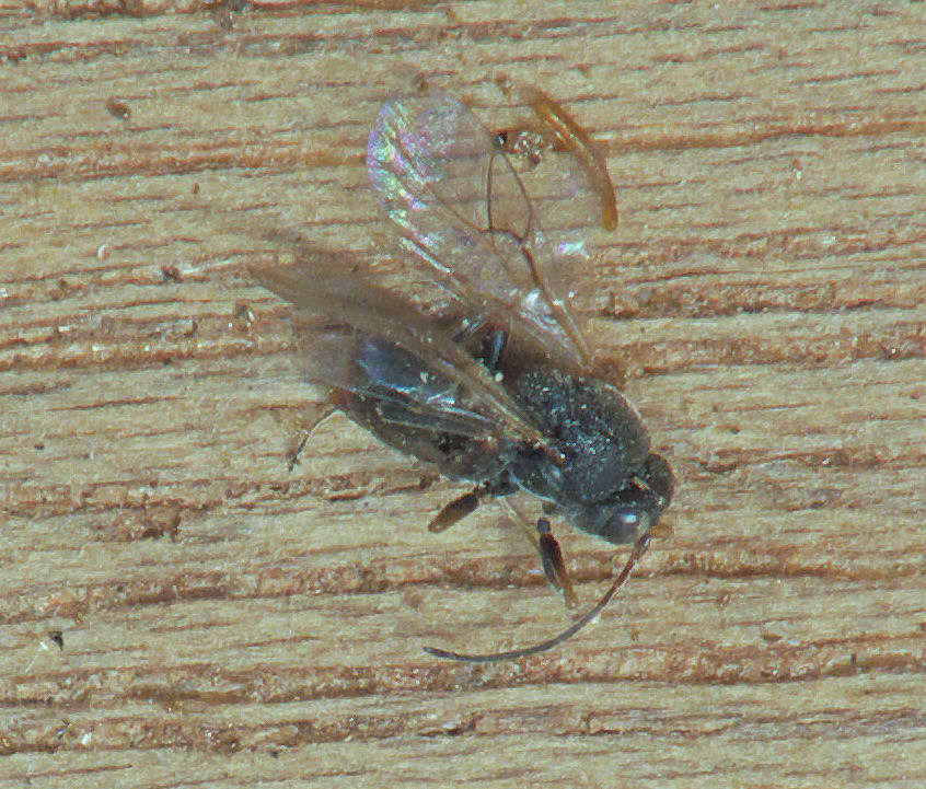 Andricus kollari, galwesp uit knikkergal op zomereik